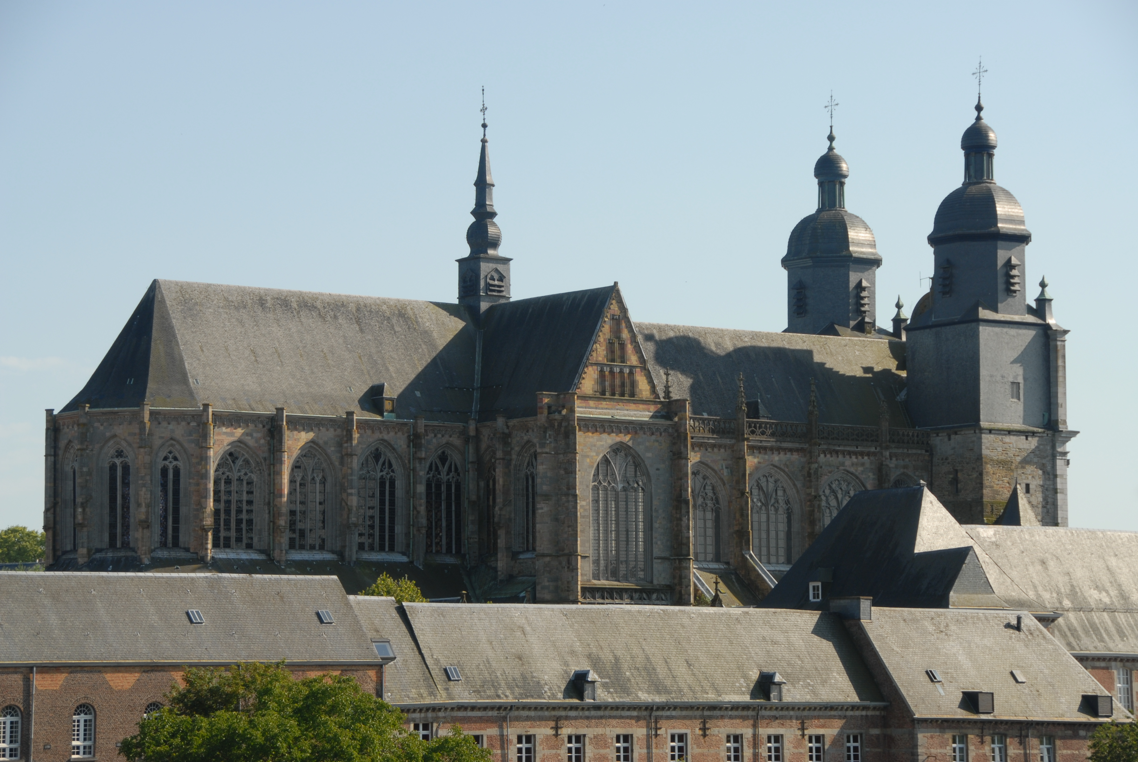 Basilique Saint-Hubert à Saint-Hubert (Belgique), vue du nord